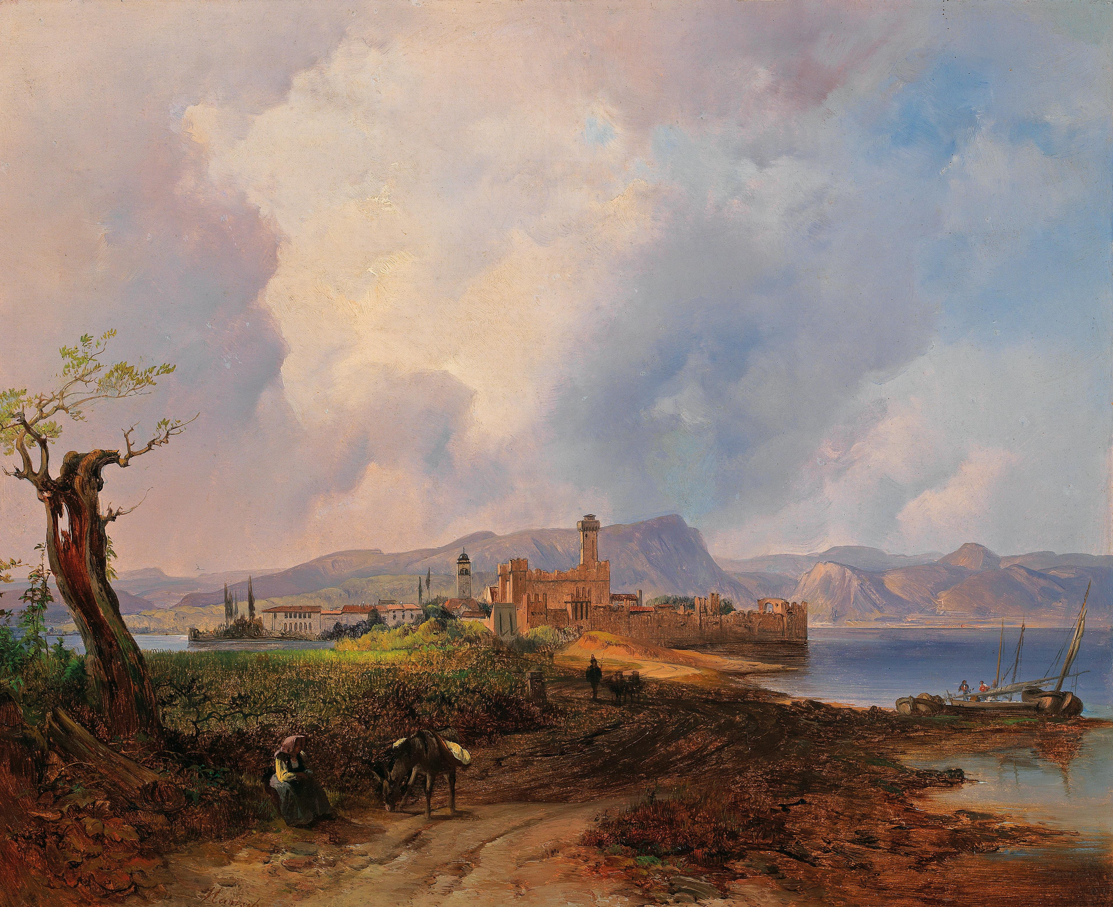 “Ansicht des Castell Sermio, auf der Insel Sermione am Gardasee” rückseitig alt betitelt, signiert Hansch, Öl auf Papier auf Leinwand, 33,5 x 41,5 cm